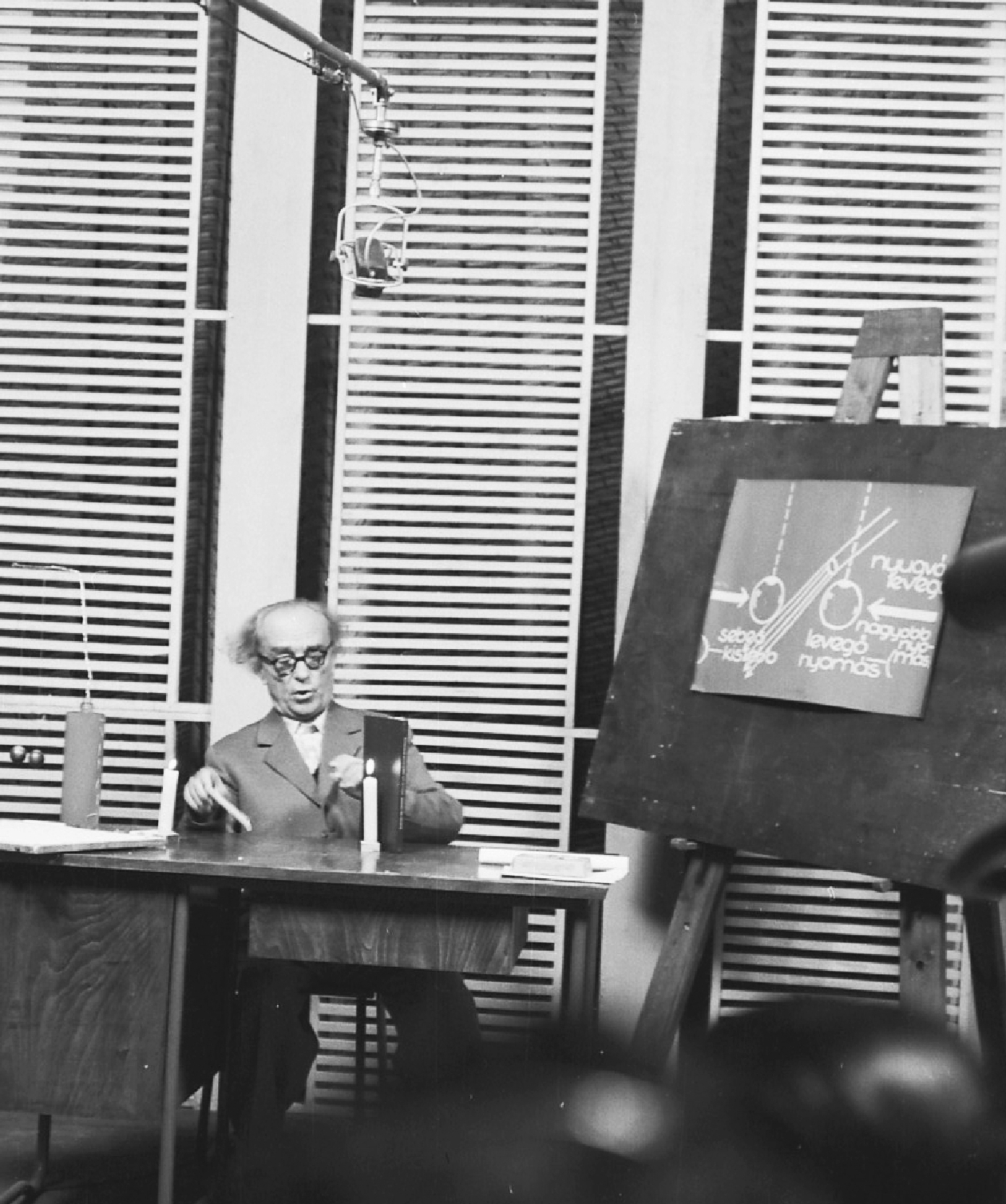 BUDAPEST V. MTV stúdió, Öveges József professzor.